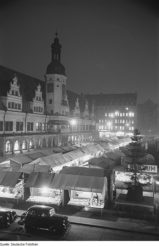 Original image description from the Deutsche Fotothek Nachtansicht Weihnachtsmarkt